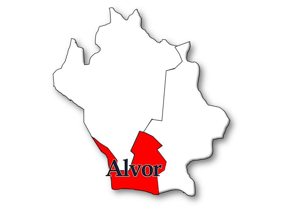 Censos 1864/2011